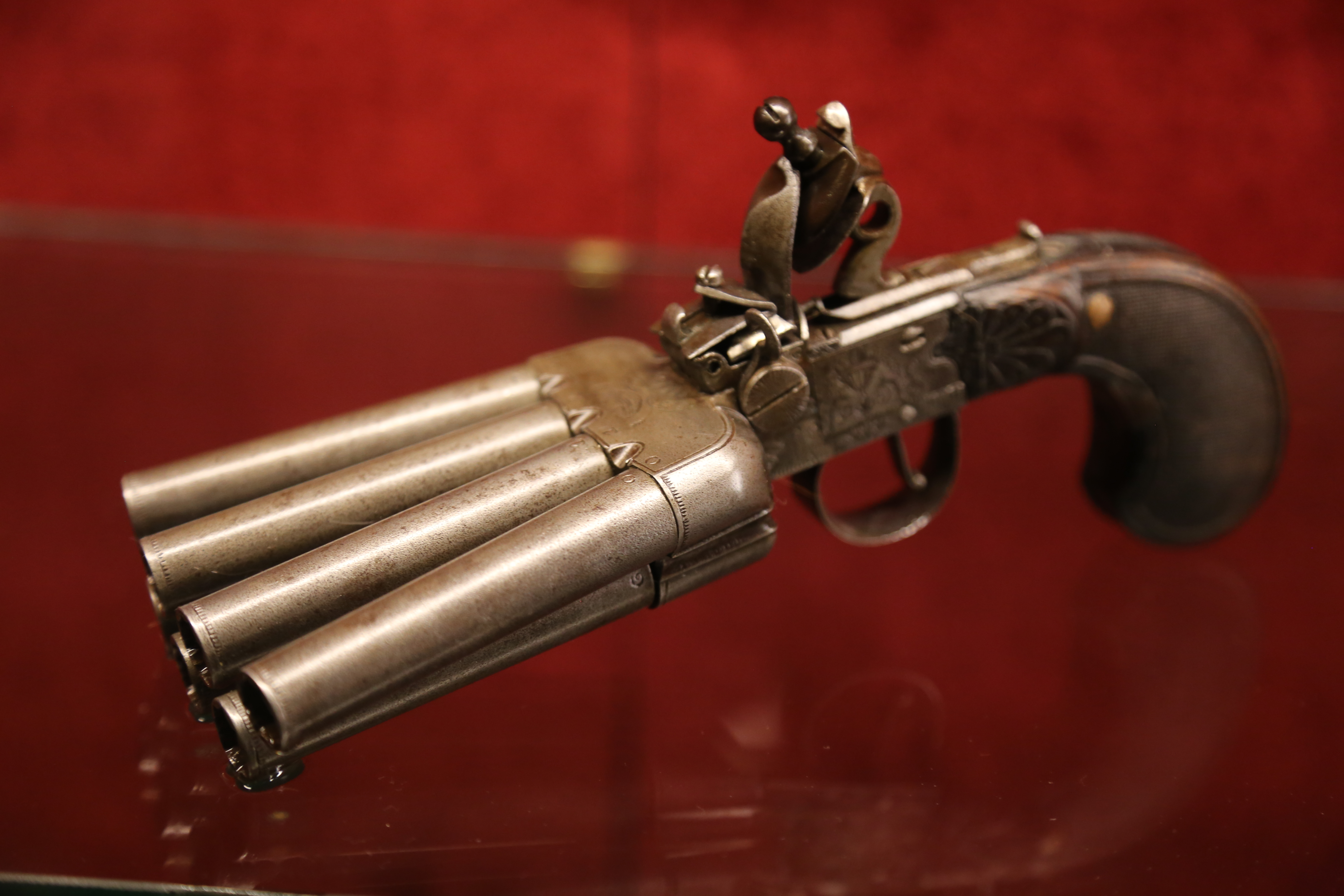 Museo Lara